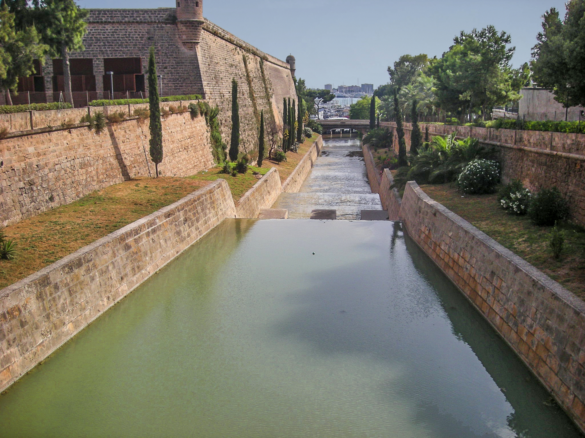 Sa Riera. Desembocadura a Palma. Mallorca.